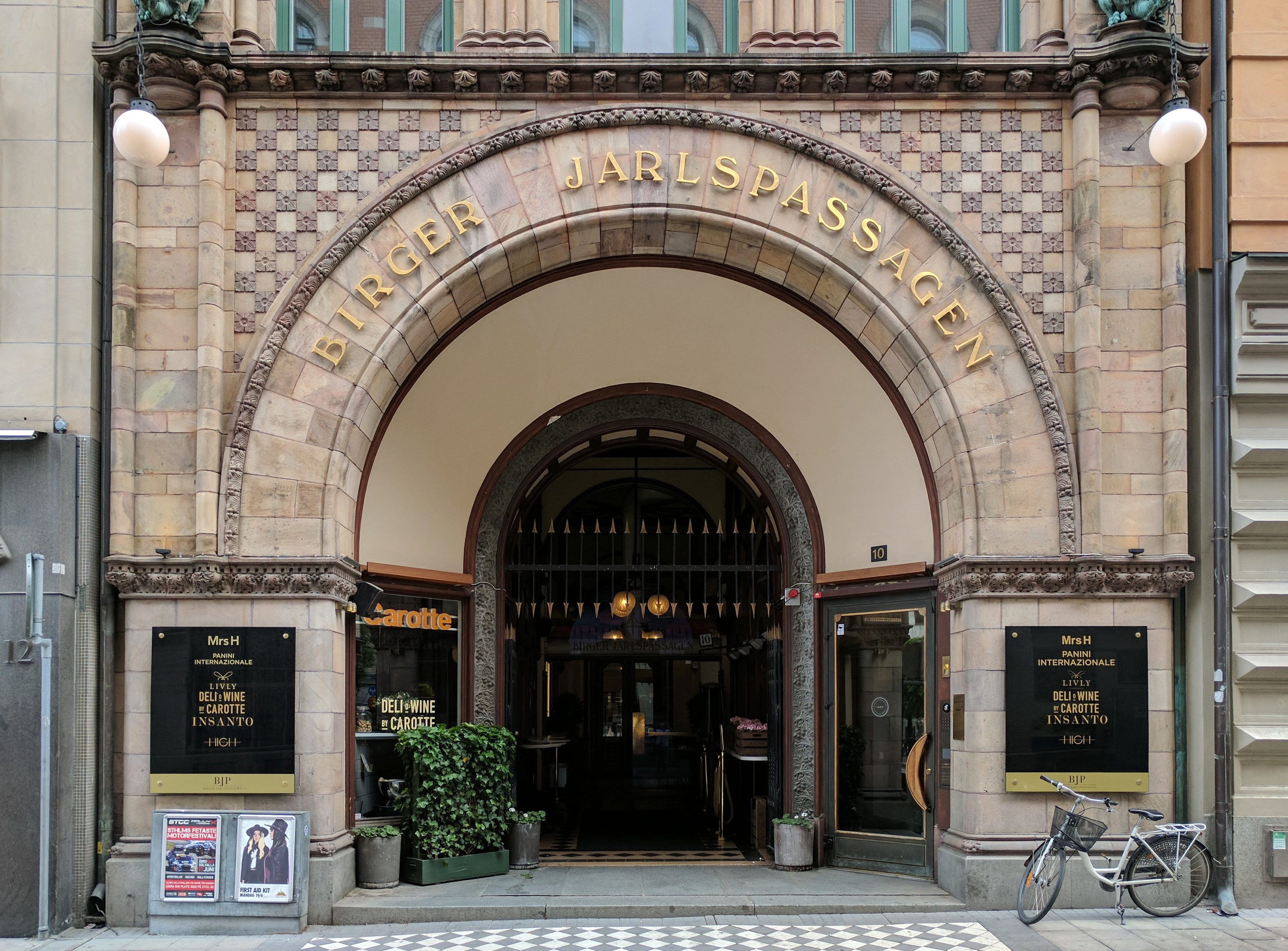 Ingång till Birger Jarlspassagen